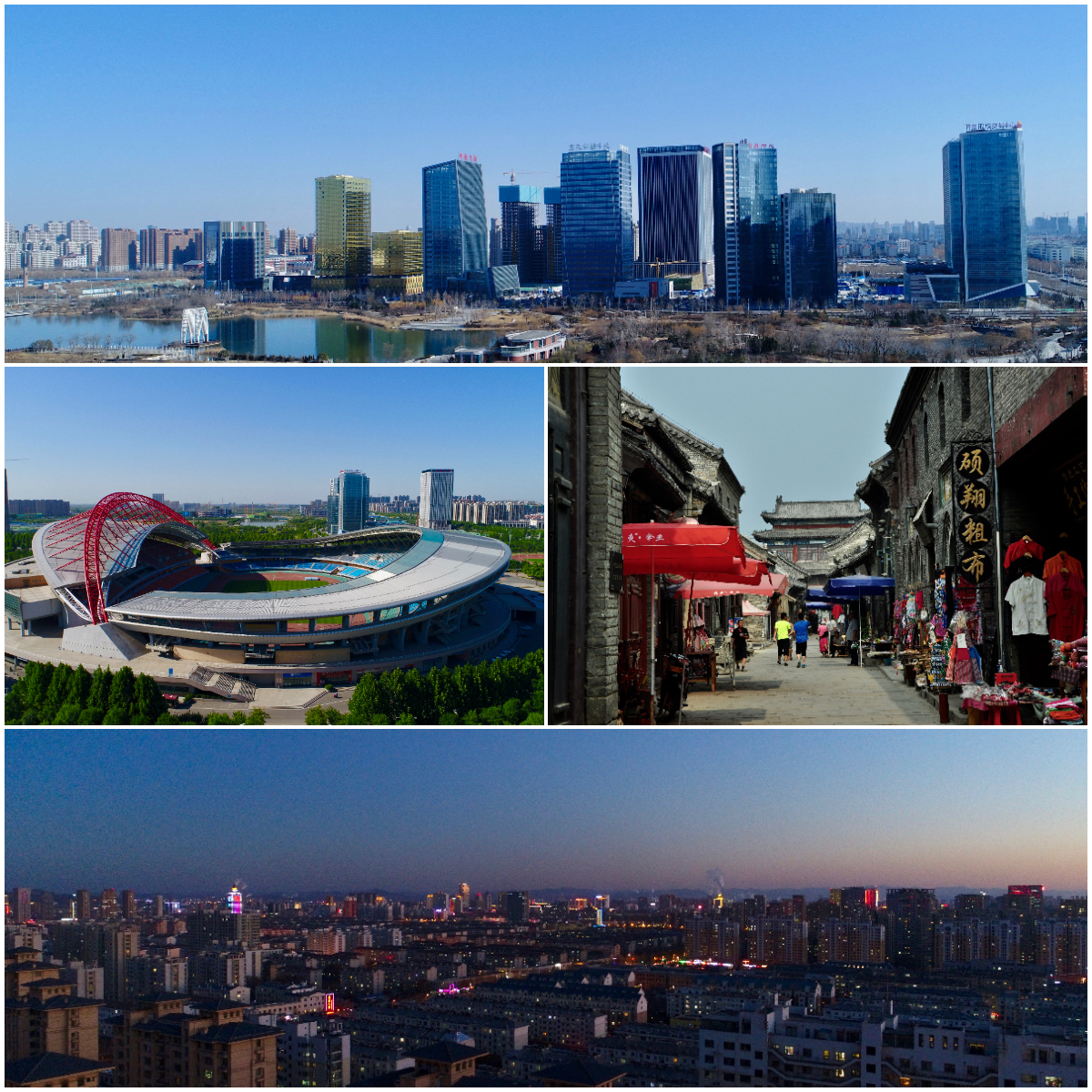 zibo montage